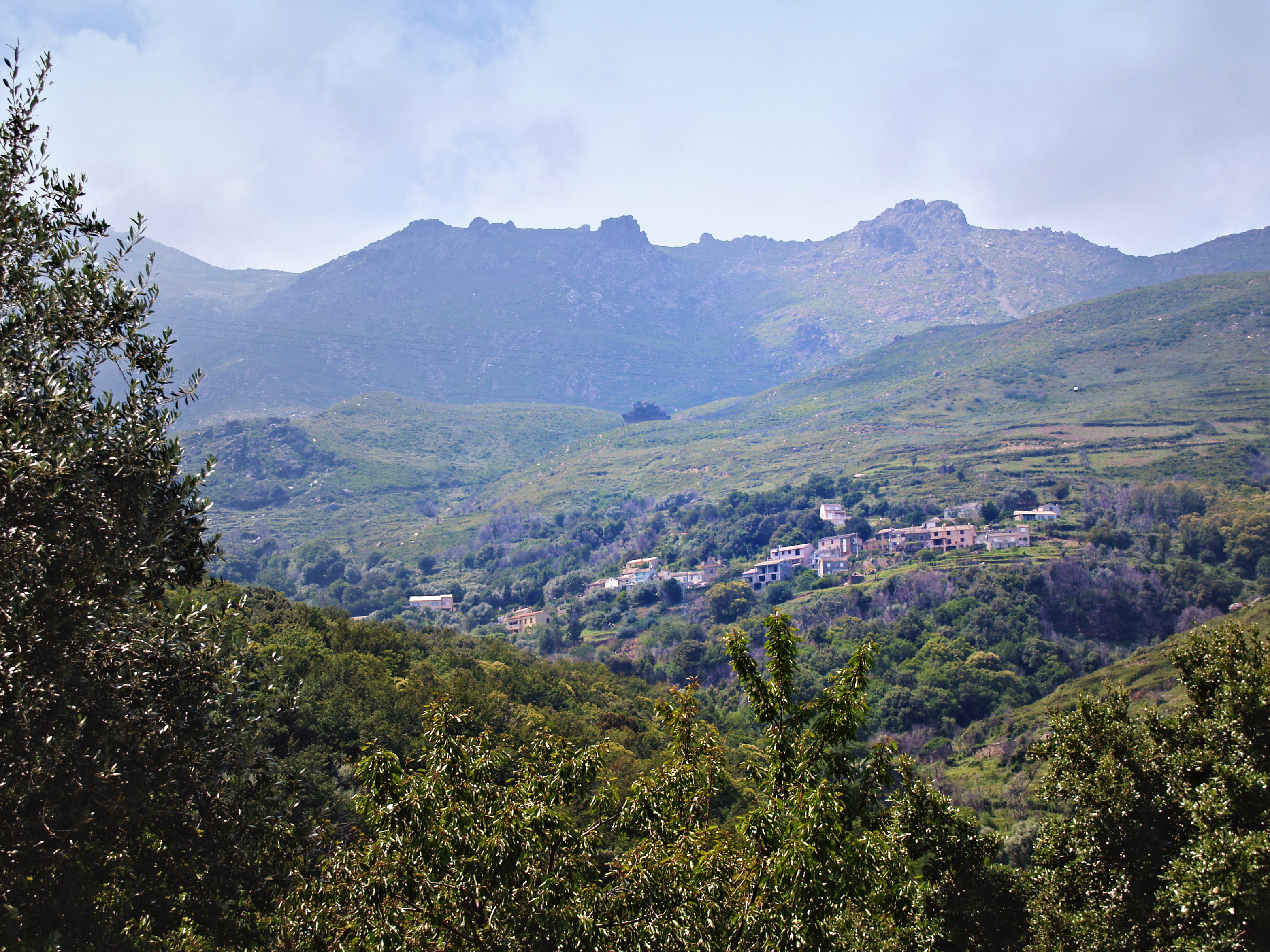 Brando - Hameau de Silgaggia et la ligne de crête du Monte Stellu